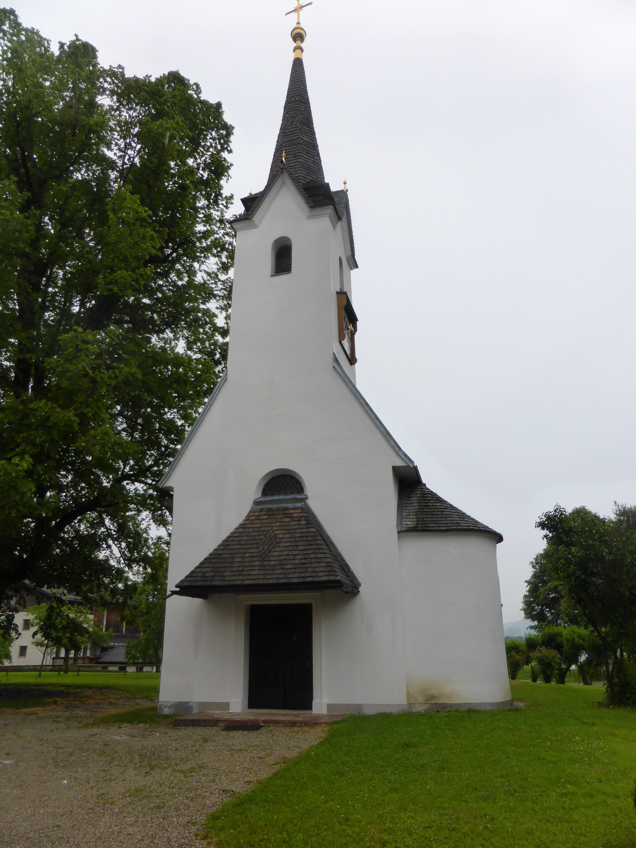 Gesamtanlage Zellhof